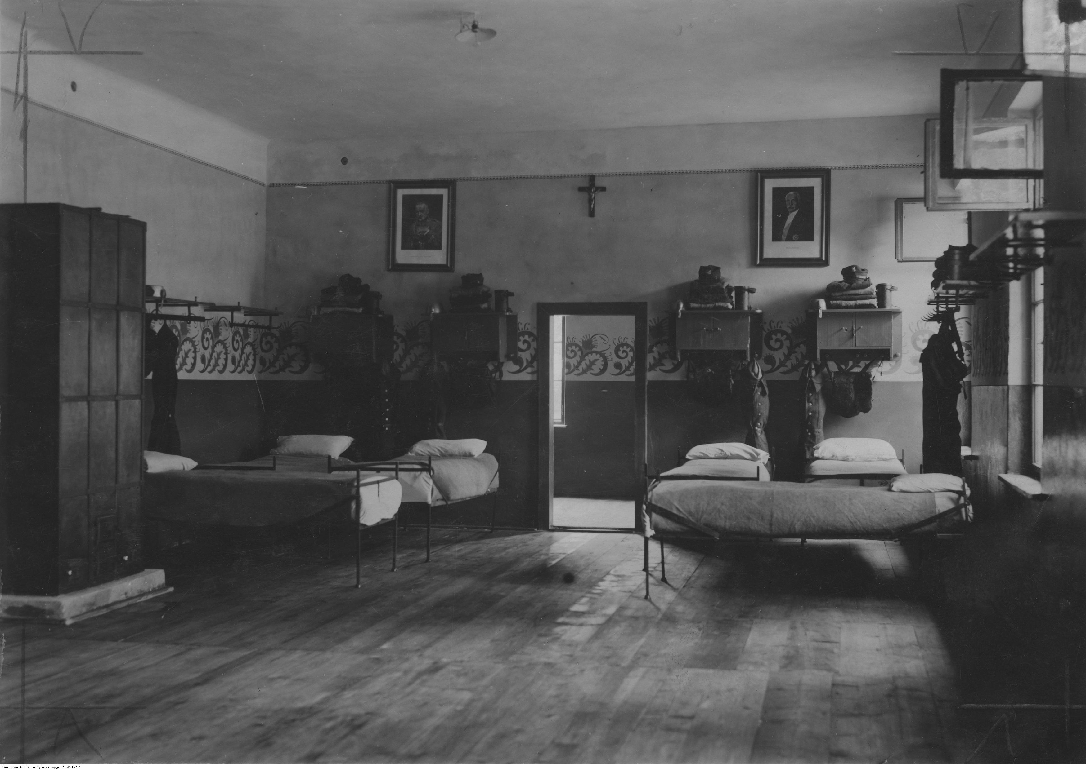 Izba żołnierska 5 Batalionu Saperów w Krakowie. Koncern Ilustrowany Kurier Codzienny - Archiwum Ilustracji. Sygnatura: 1-W-1717